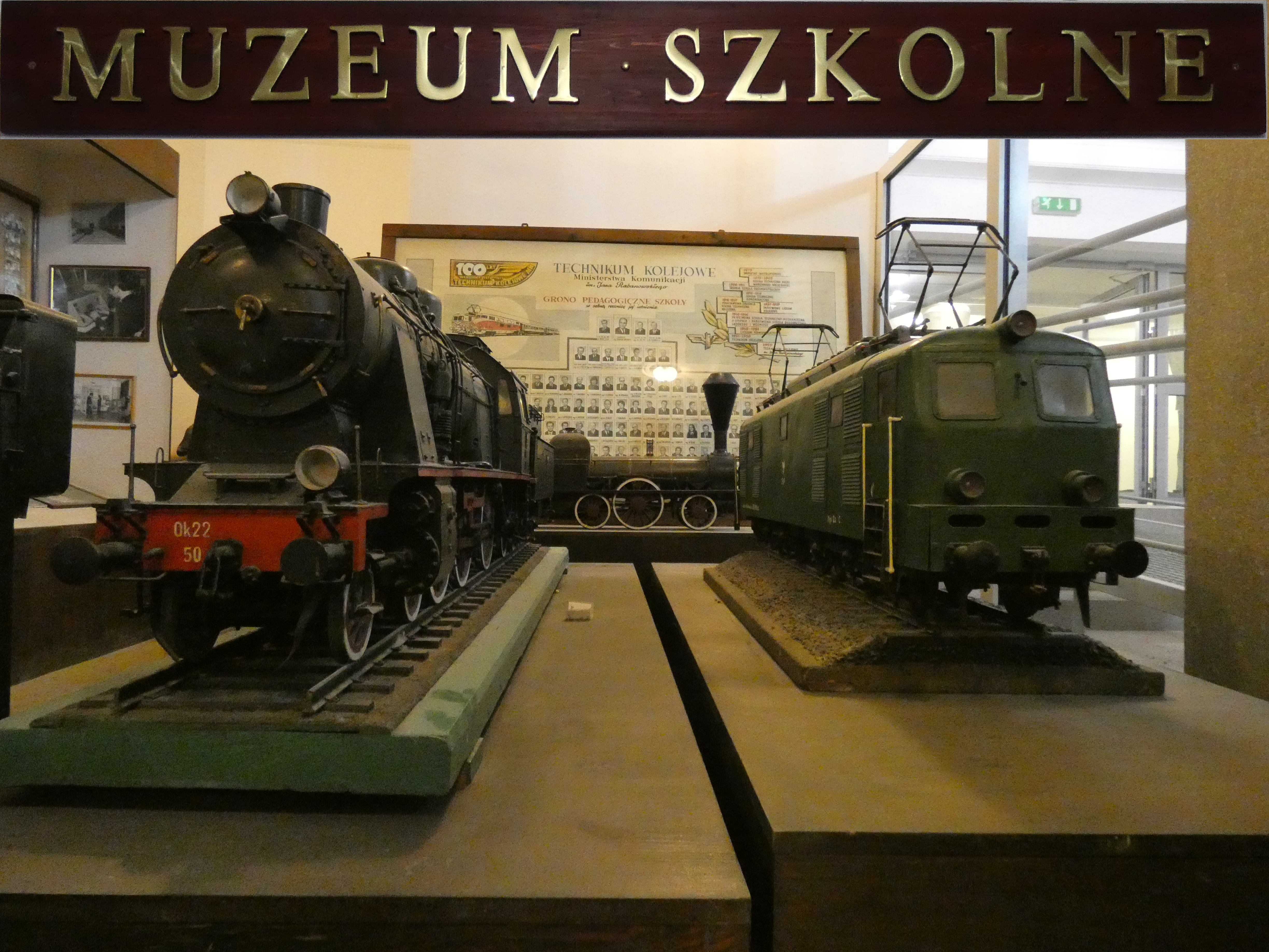 Technikum nr 7 w Warszawie